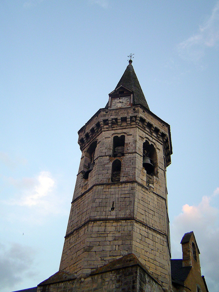 Esglèsia de Sant Miqueu (Viella)